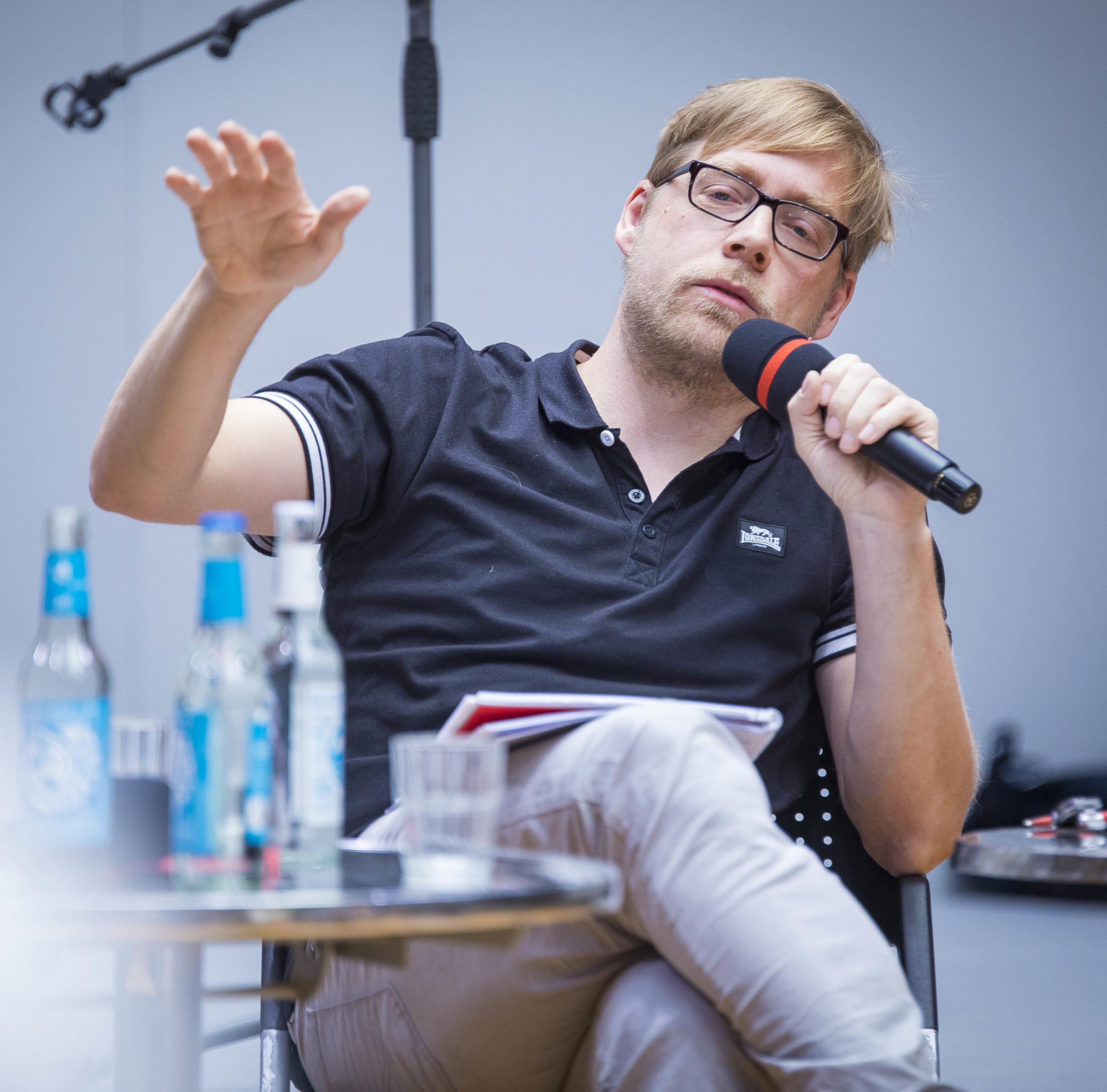 Podiumsdiskussion: "Partei der Zukunft: Partei in Bewegung" Mit Niklas Haupt (Mittelfränkischer Spitzen-kandidat der LINKEN zu den bayerischen Landtagswahlen), Thomas Goes (Wiss. Mitarbeiter am Soziologischen Forschungsinstitut (SOFI) Göttingen) und Jörg Schindler (Bundesgeschäftsführer DIE LINKE)